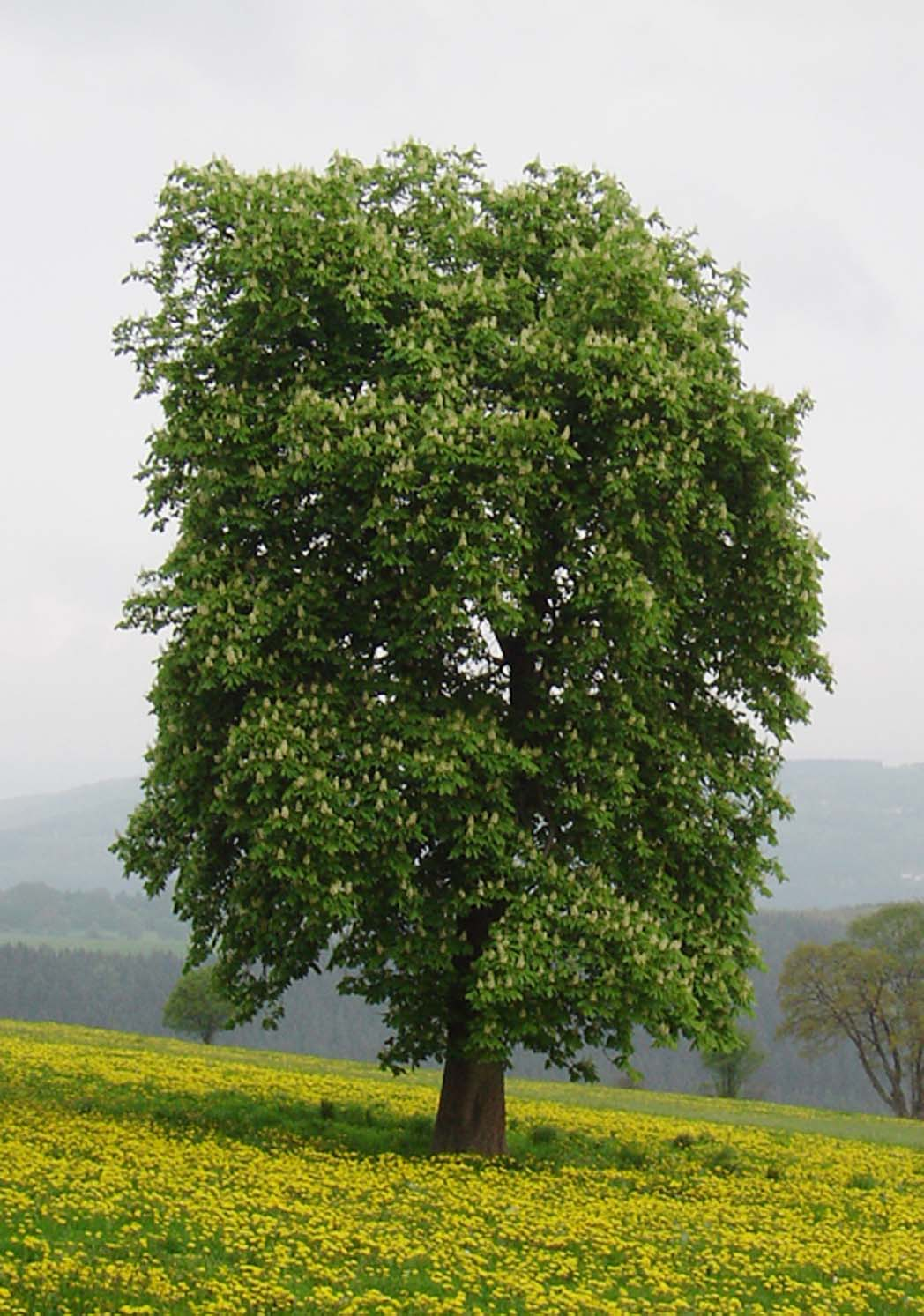 Paardekastanje vrijstaand eigen foto